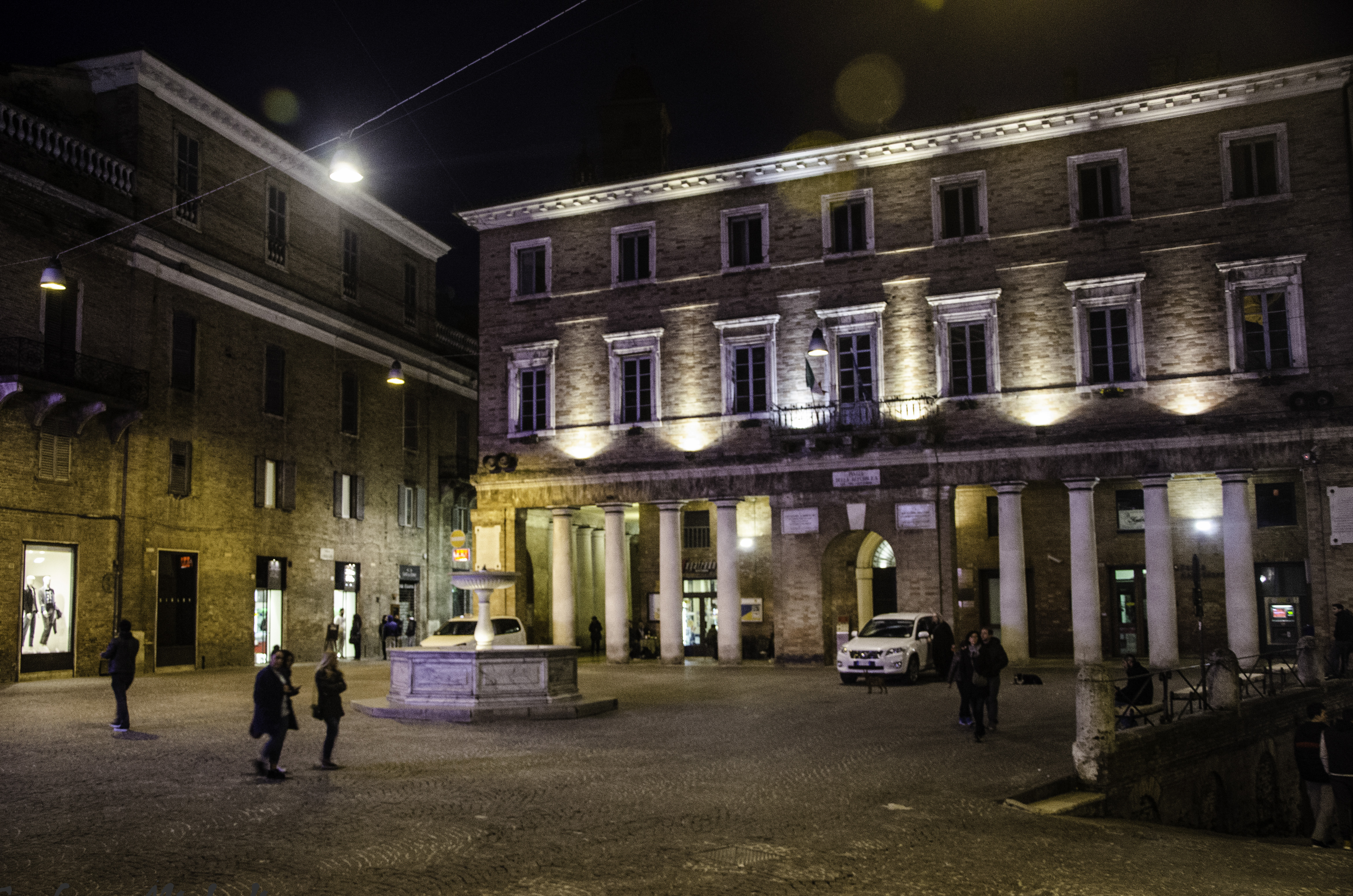 Palazzo Albani This is a photo of a monument which is part of cultural heritage of Italy.